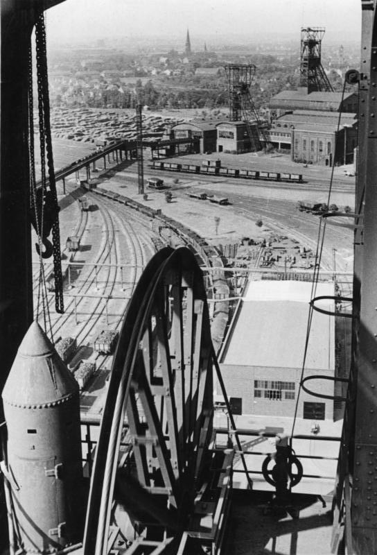 Essen, Zeche "Zollverein" Illus-Stachelscheidt Ruhrbergbau, Februar 1949 Anlage Zeche "Zollverein", Essen. 2867-49